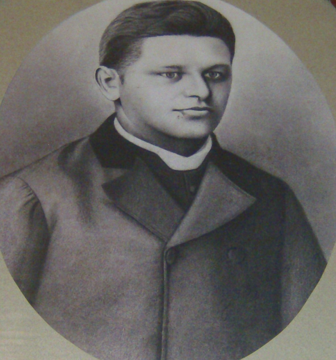 Padre Sebastião Bastos de Almeida, 1º paróco do município da Serra da Raiz, estado da Paraíba.